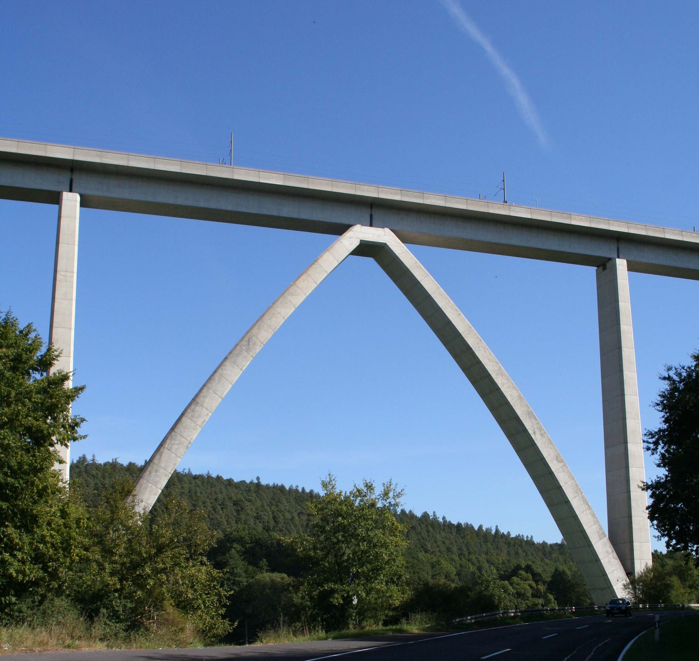 Rombachtalbrücke bei Schlitz